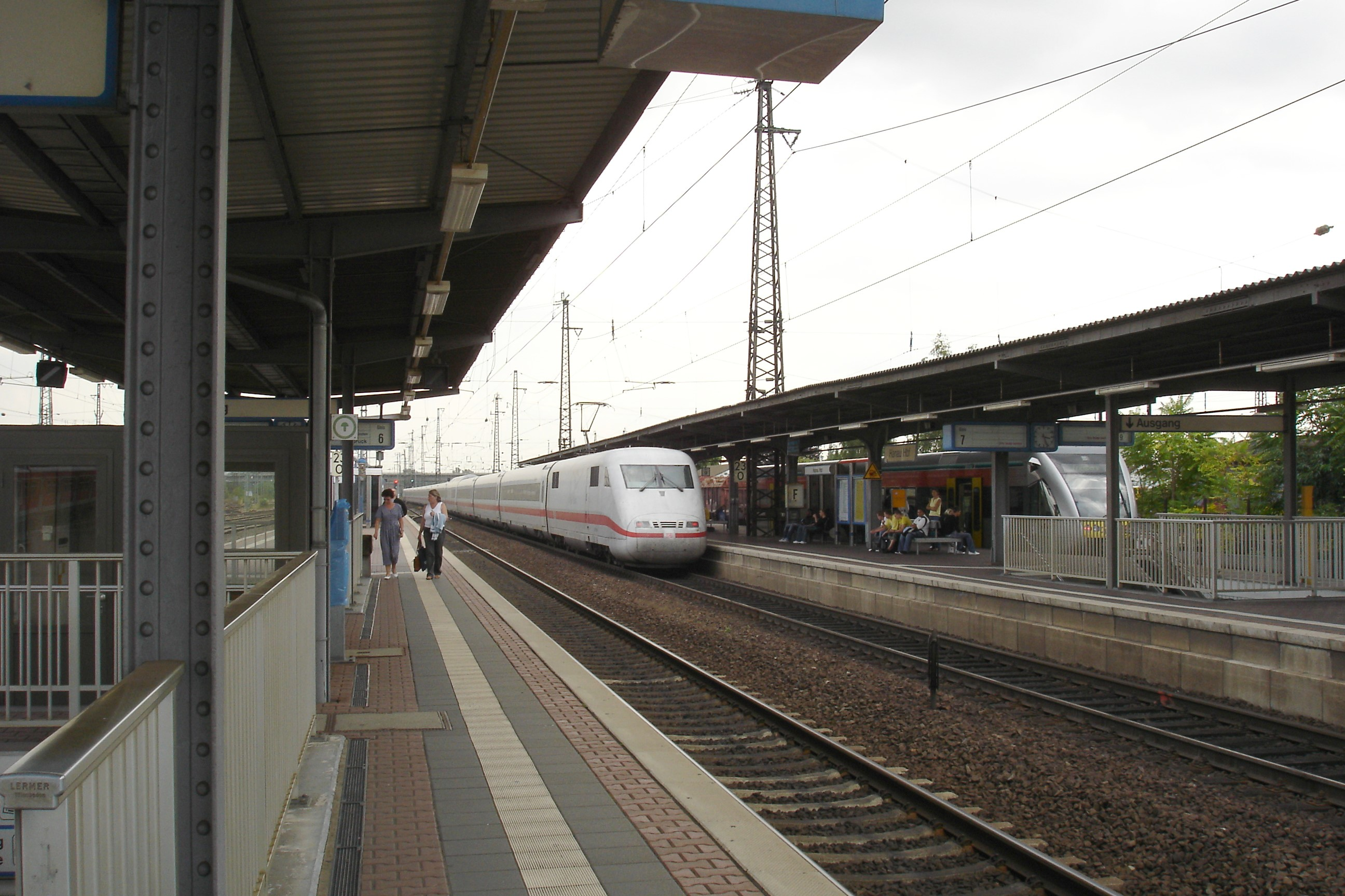 Hauptbahnhof Hanau am Main, ICE-Halt